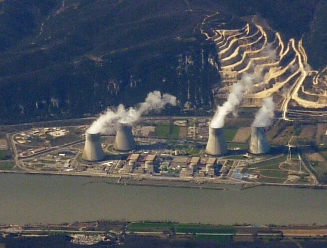 Le site nucléaire de Cruas en France, vu depuis le ciel, sur la route aérienne reliant Marseille à Stockholm.